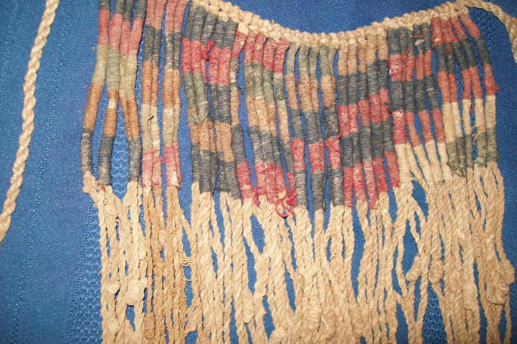 Detalles de un Quipu